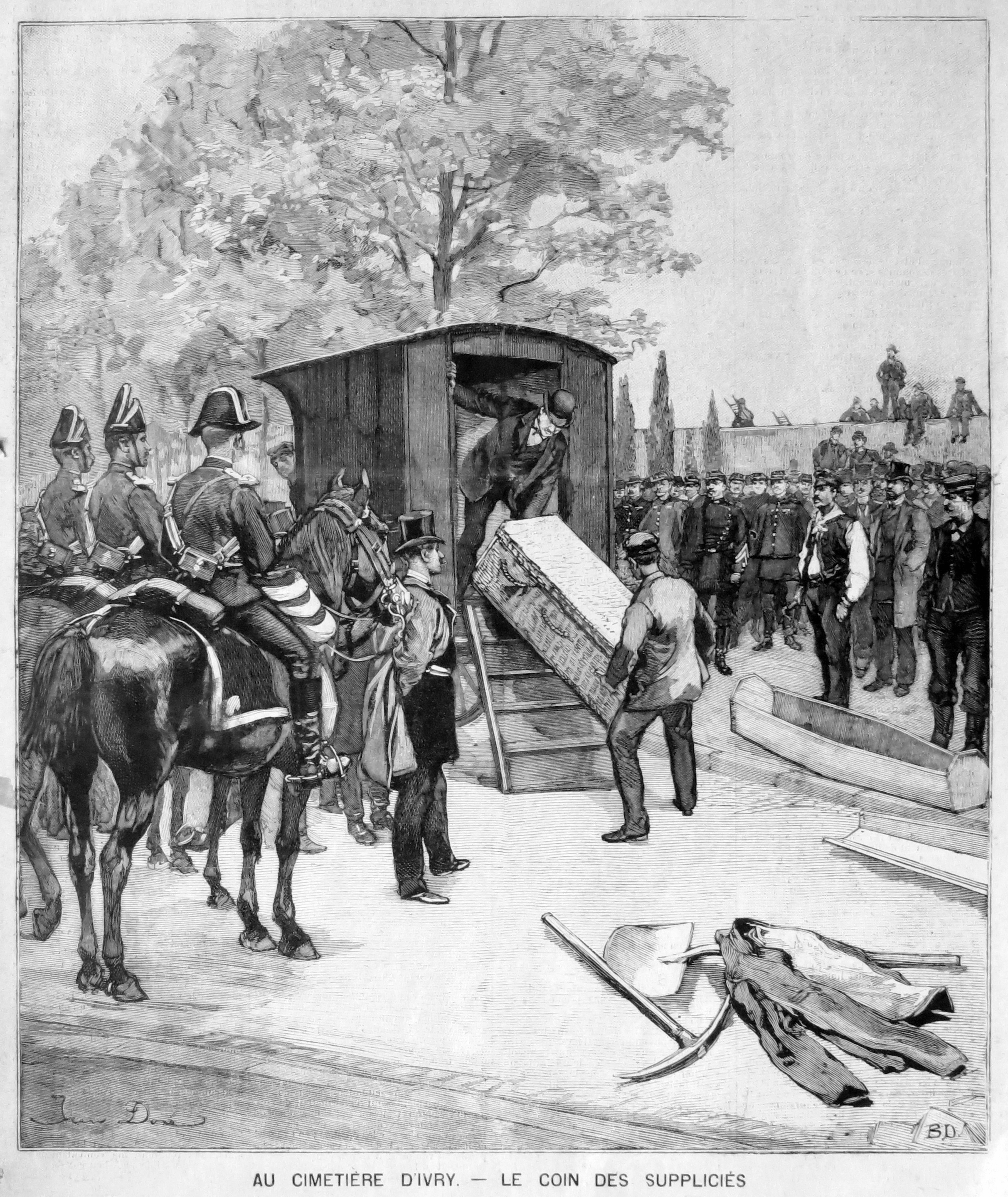 Arrivée au cimetière d'Ivry, coin des suppliciés, du fourgon amenant le corps de l'anarchiste Émile Henry, guillotiné le 21 mai 1894.